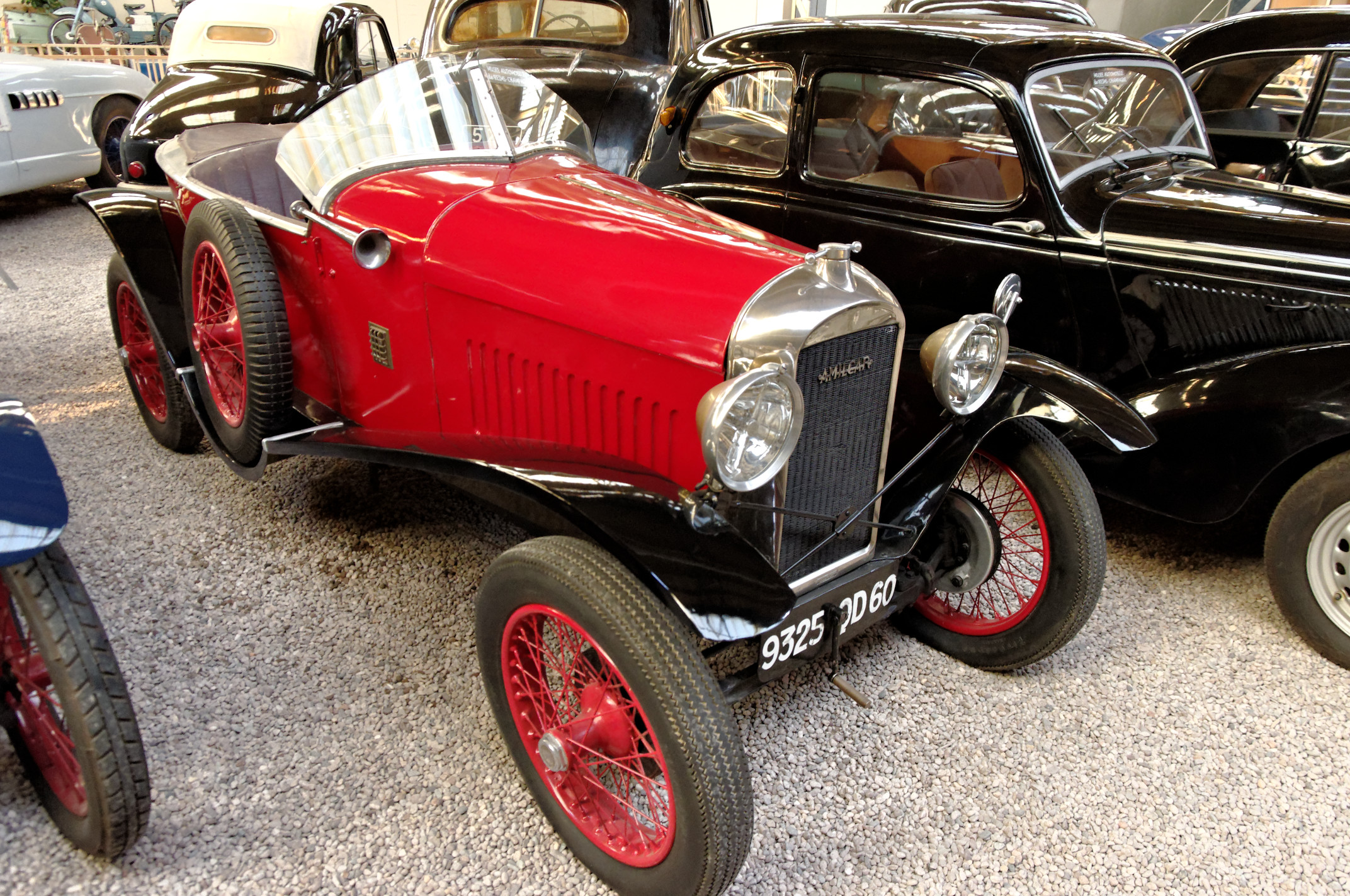 Amilcar C 4 (1923), Cabriolet skiff 2 places, 4 cyl. en ligne, latéral, 1044 cm3, 33 ch., vitesse max. 100 km/h (Musée Automobile Reims Champagne, Reims, Marne, France)